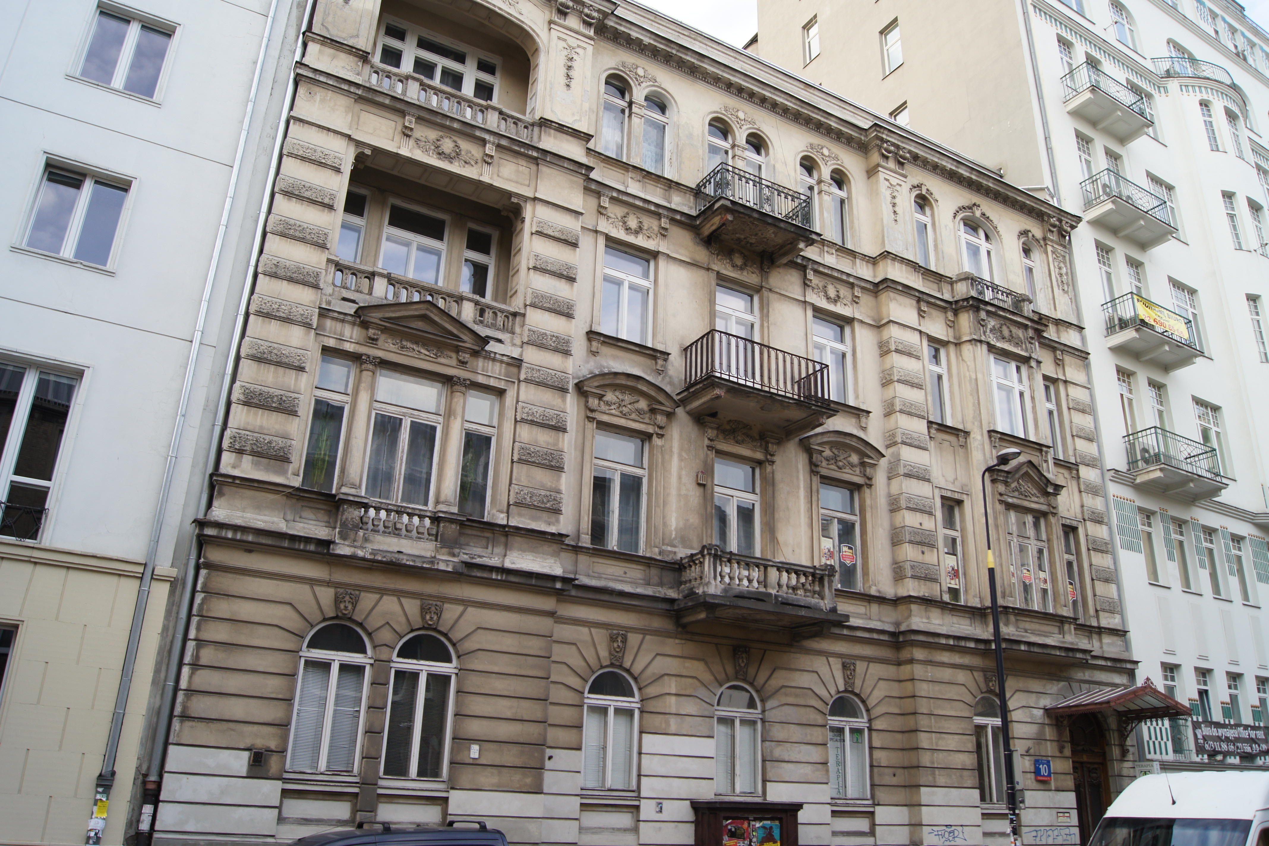 Warszawa Śródmieście, ul. Widok 10 - kamienica Grotowskiego (zabytek nr 35-A)